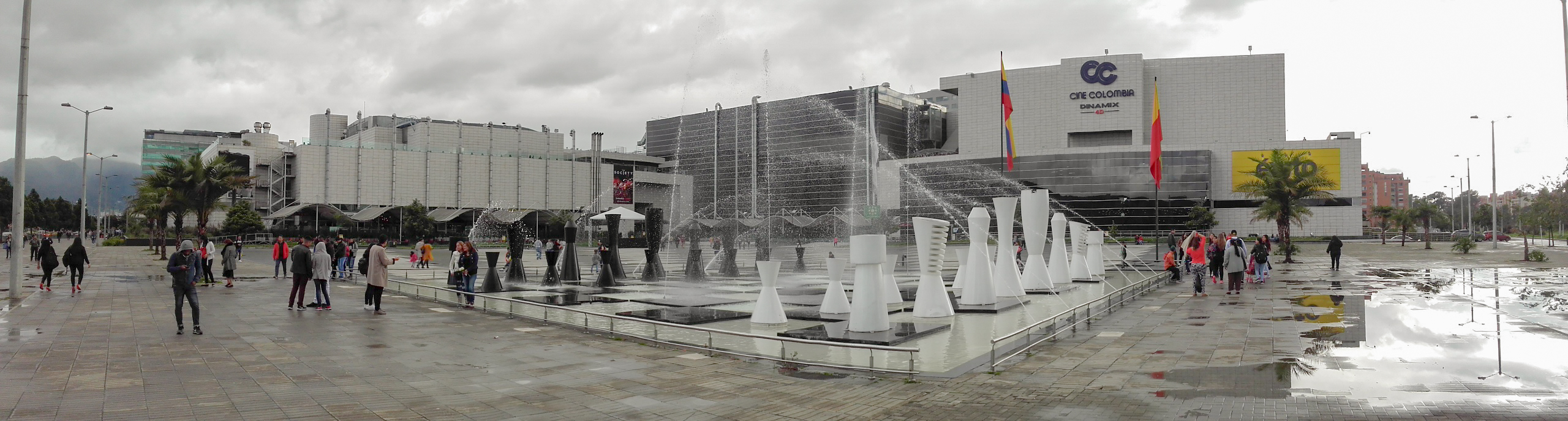 dnnfnfnfjxkx